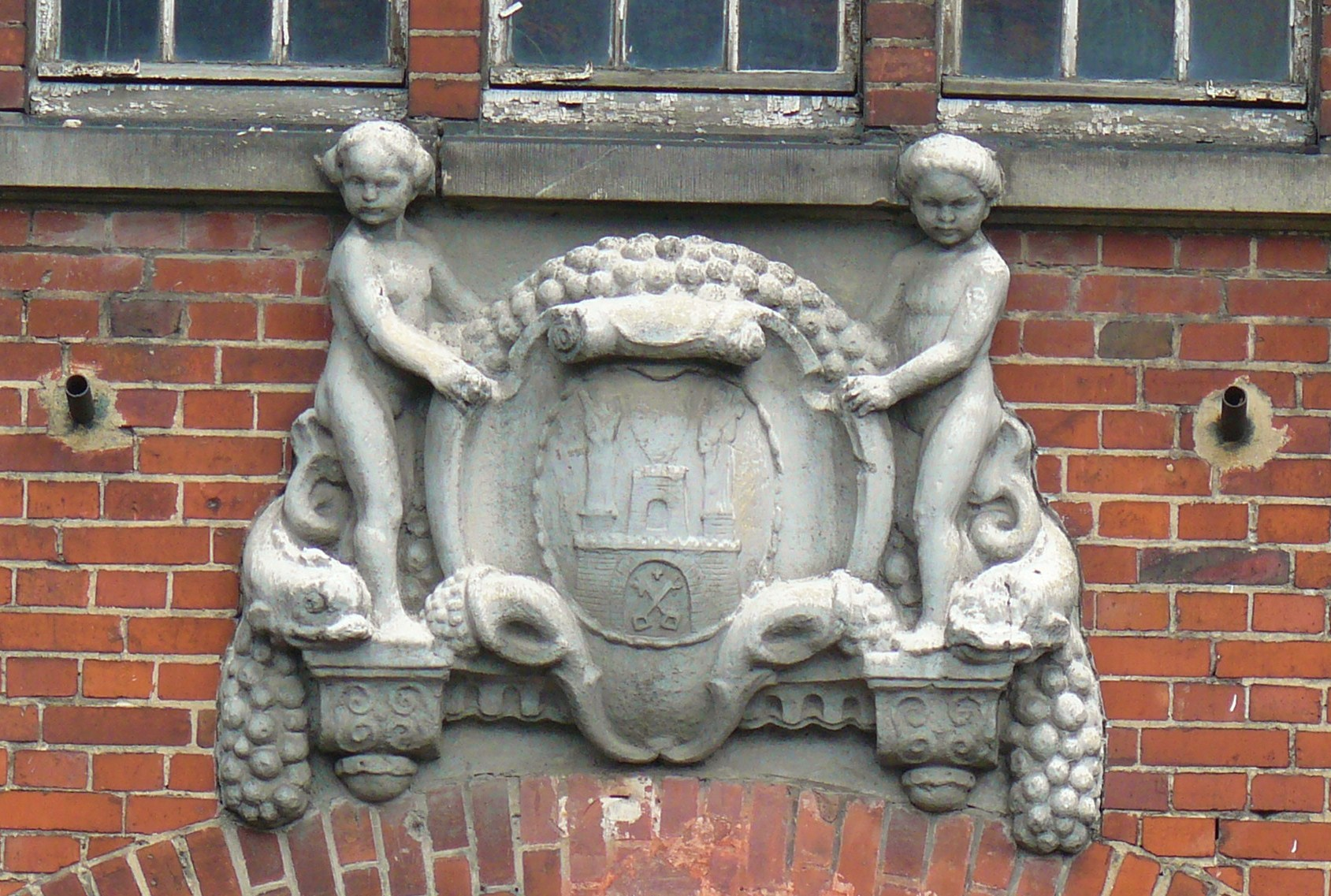 Poznań Jeżyce, ul. Słowackiego 54/60 - Szkoła Podstawowa nr 36 im. Henryka Sucharskiego, zespół zabudowań szkolnych